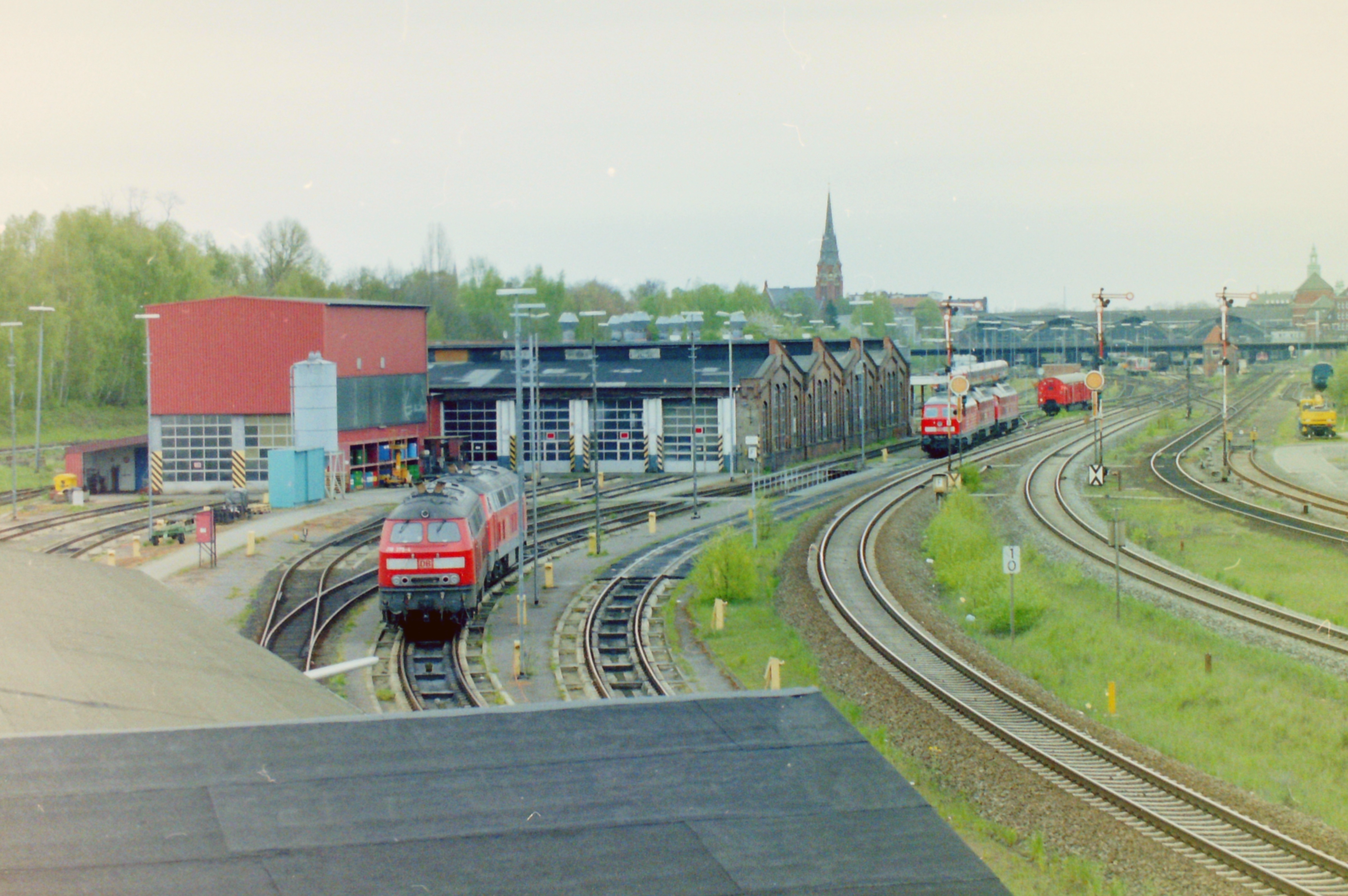 Blick vom Dach des Schuppens LEU auf die Rechteckhalle und die Abstellgruppe